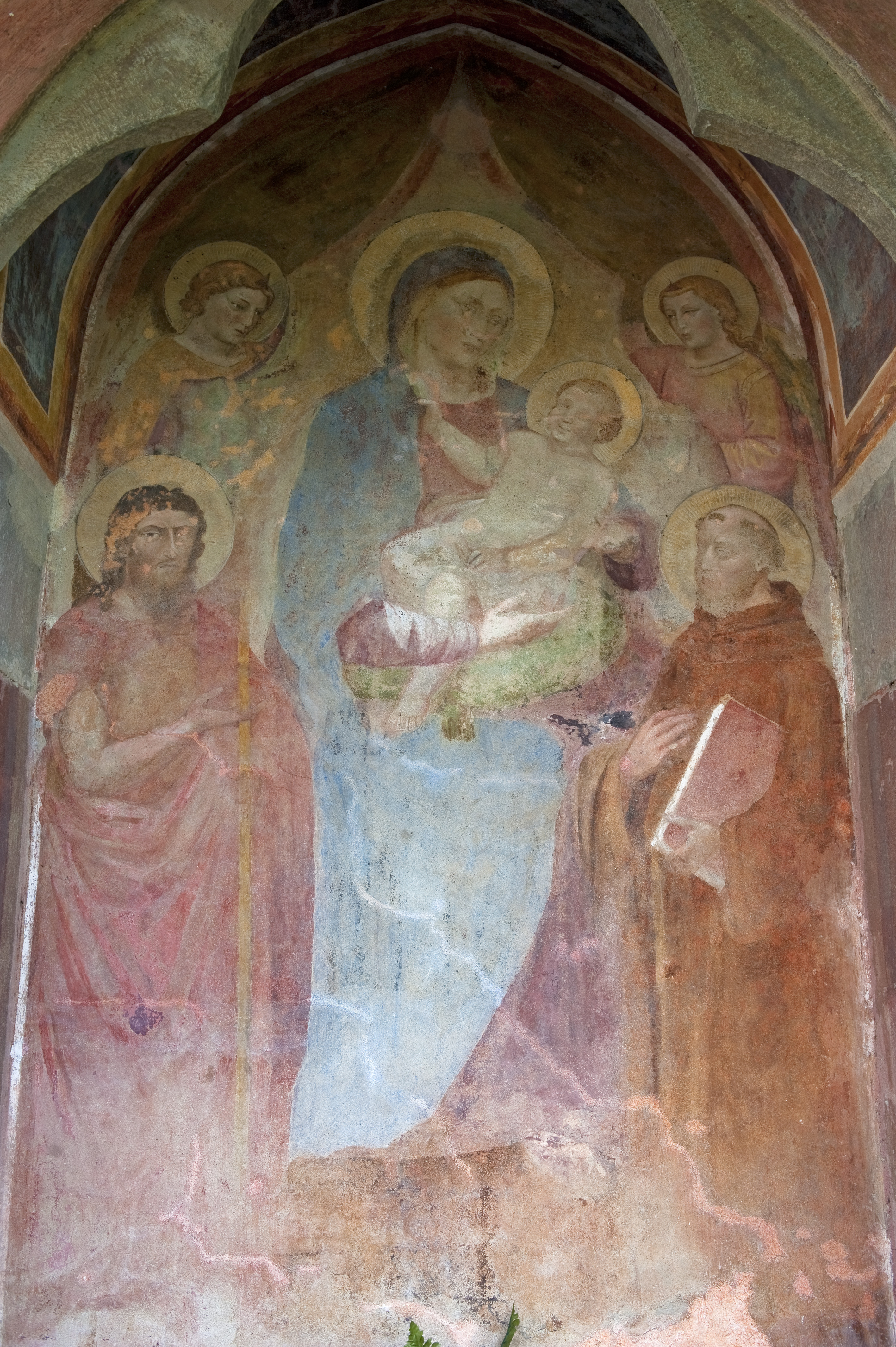 Madonna in trono con il Bambino, affiancata dai Santi Giovanni Battista e Francesco e tra due angeli reggicortina. Opera di Niccolò di Pietro Gerini, Tabernacolo di Rimaggino. Bagno a Ripoli